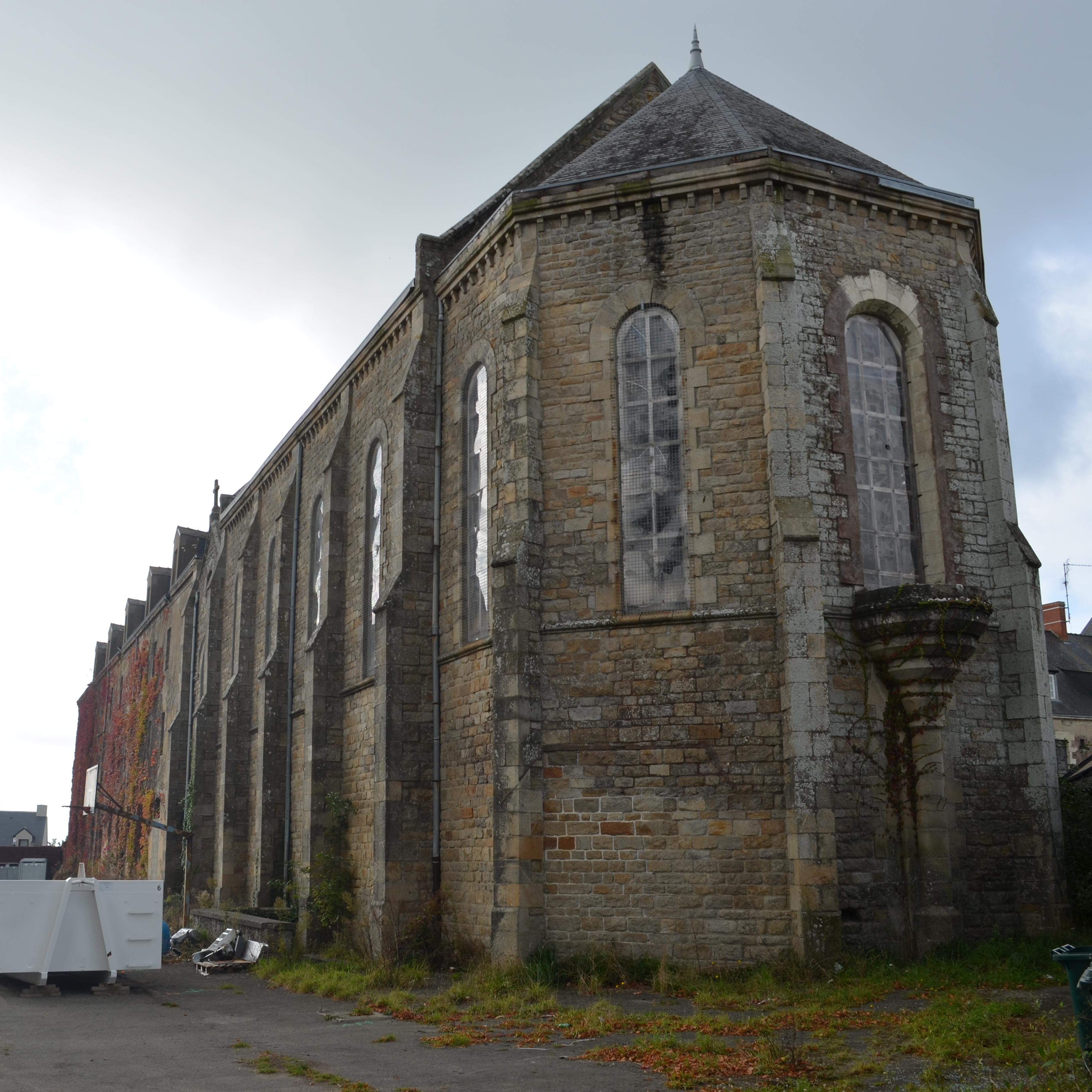 Couvent des Ursulines, actuellement désaffecté - Guérande (Loire-Atlantique) .